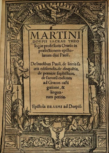 Martinus Dorpius (1485-1525) Oratio in praelectionem epistolarum divi Pauli (Antuérpia, 1519)